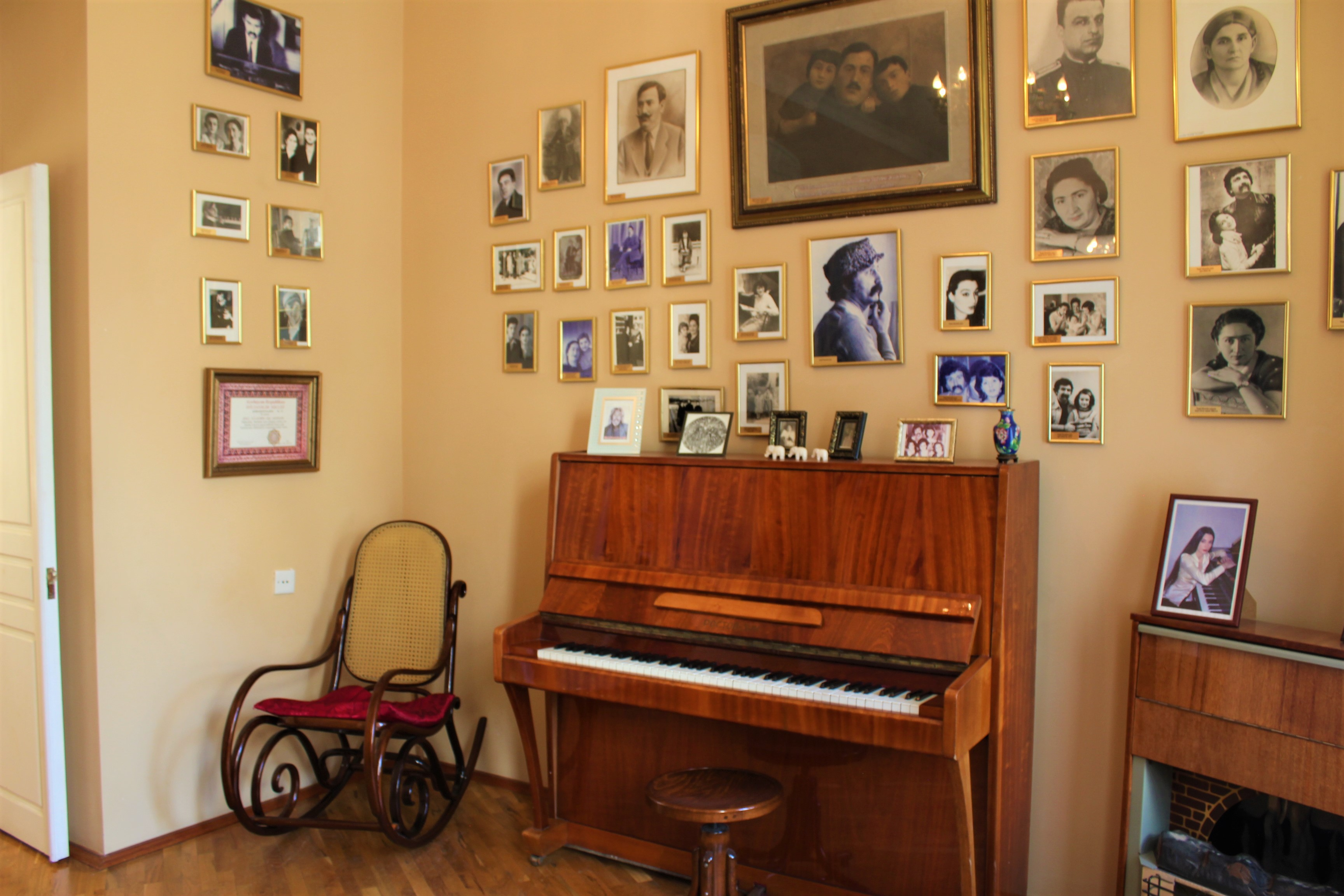 Интерьер дома-музея азербайджанского джазового композитора и пианиста Вагифа Мустафазаде.